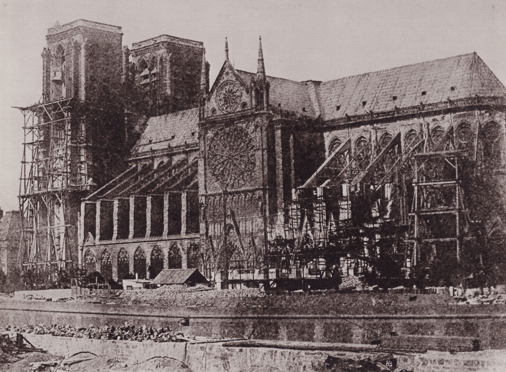 Bayard, Hippolyte: Notre-Dame de Paris [2]